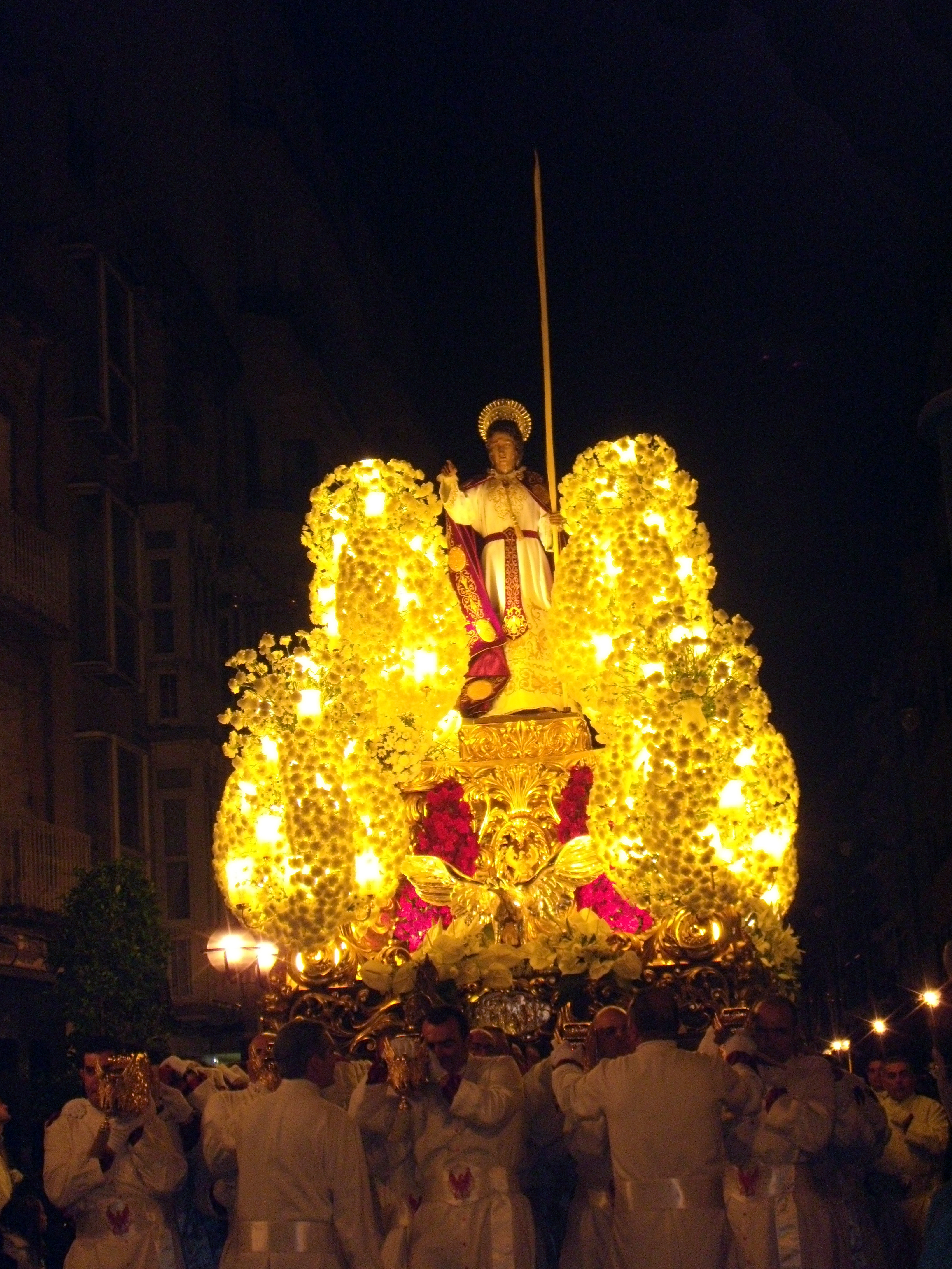 Trono de San Juan (Marrajos). Procesión del Santo Entierro. Cartagema